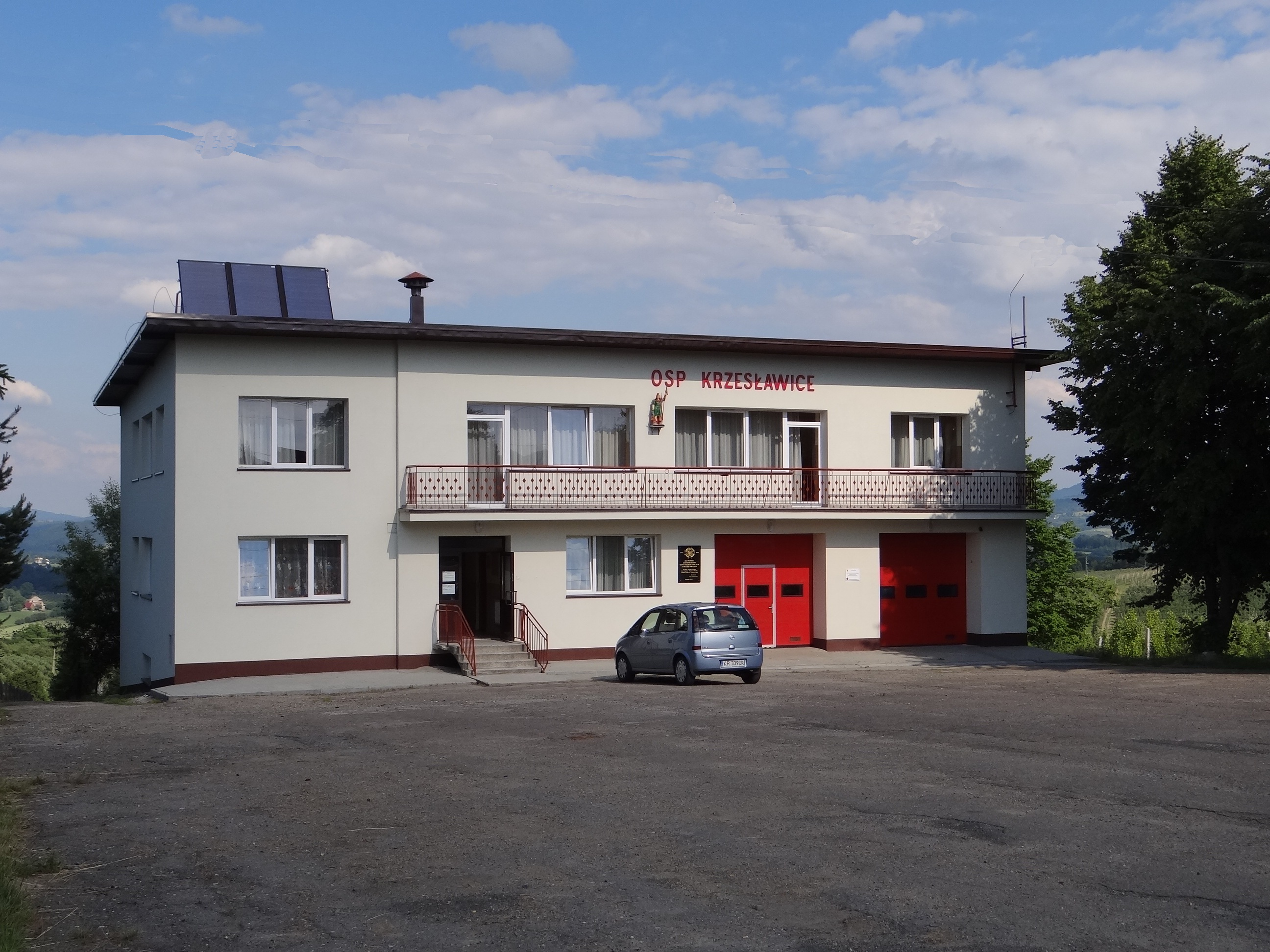 Remiza OSP w Krzesławicach